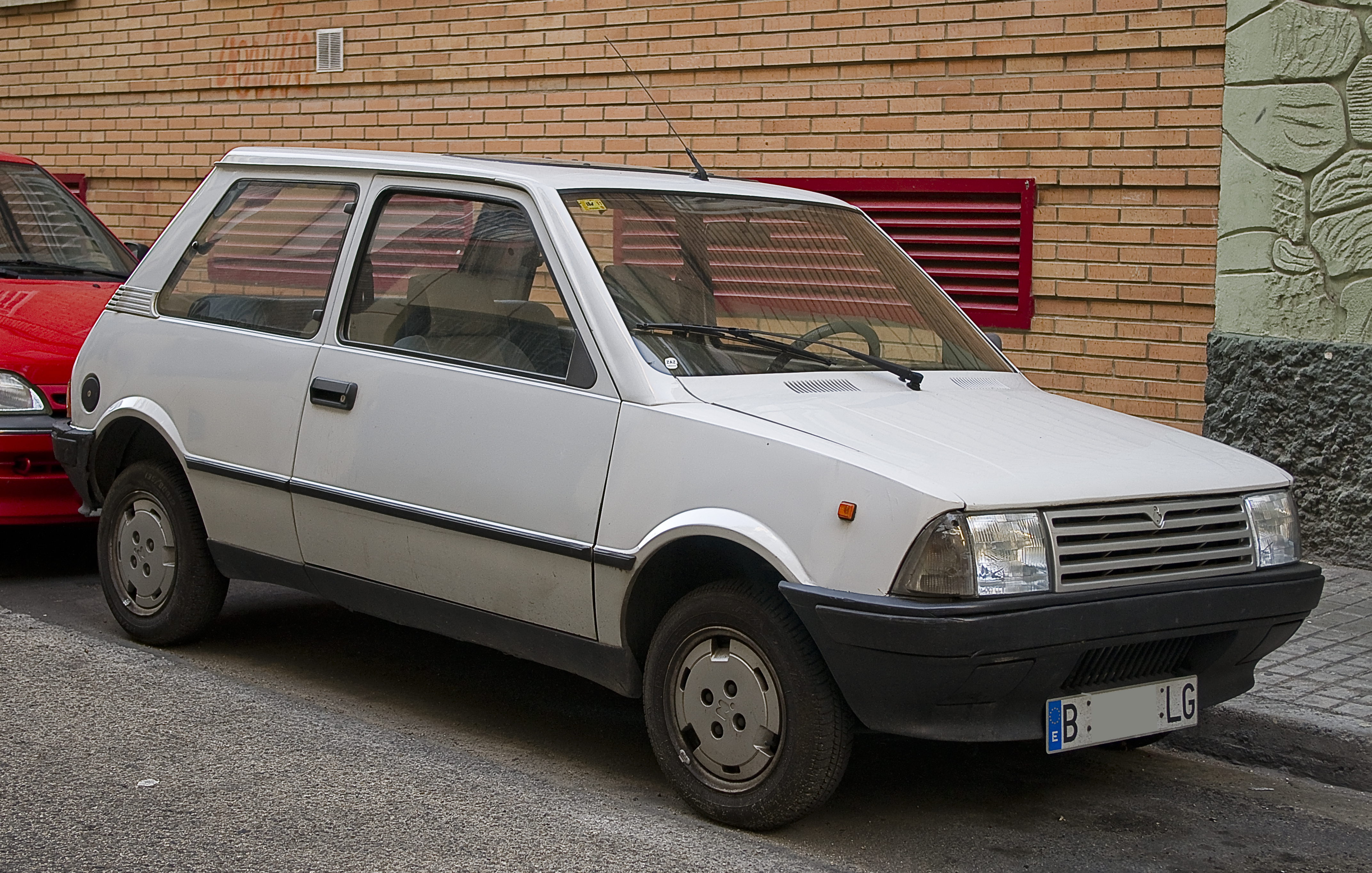 1990 Innocenti 990 'small'